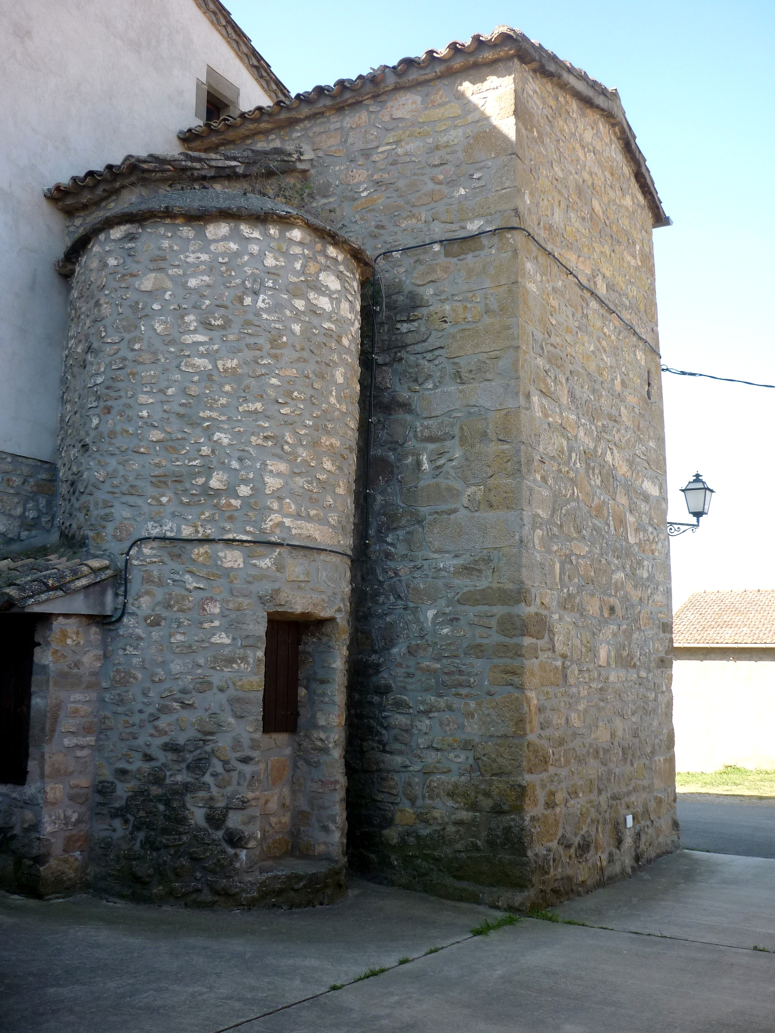 Mas Flotats (Clariana de Cardener): la típica cisterna de la zona